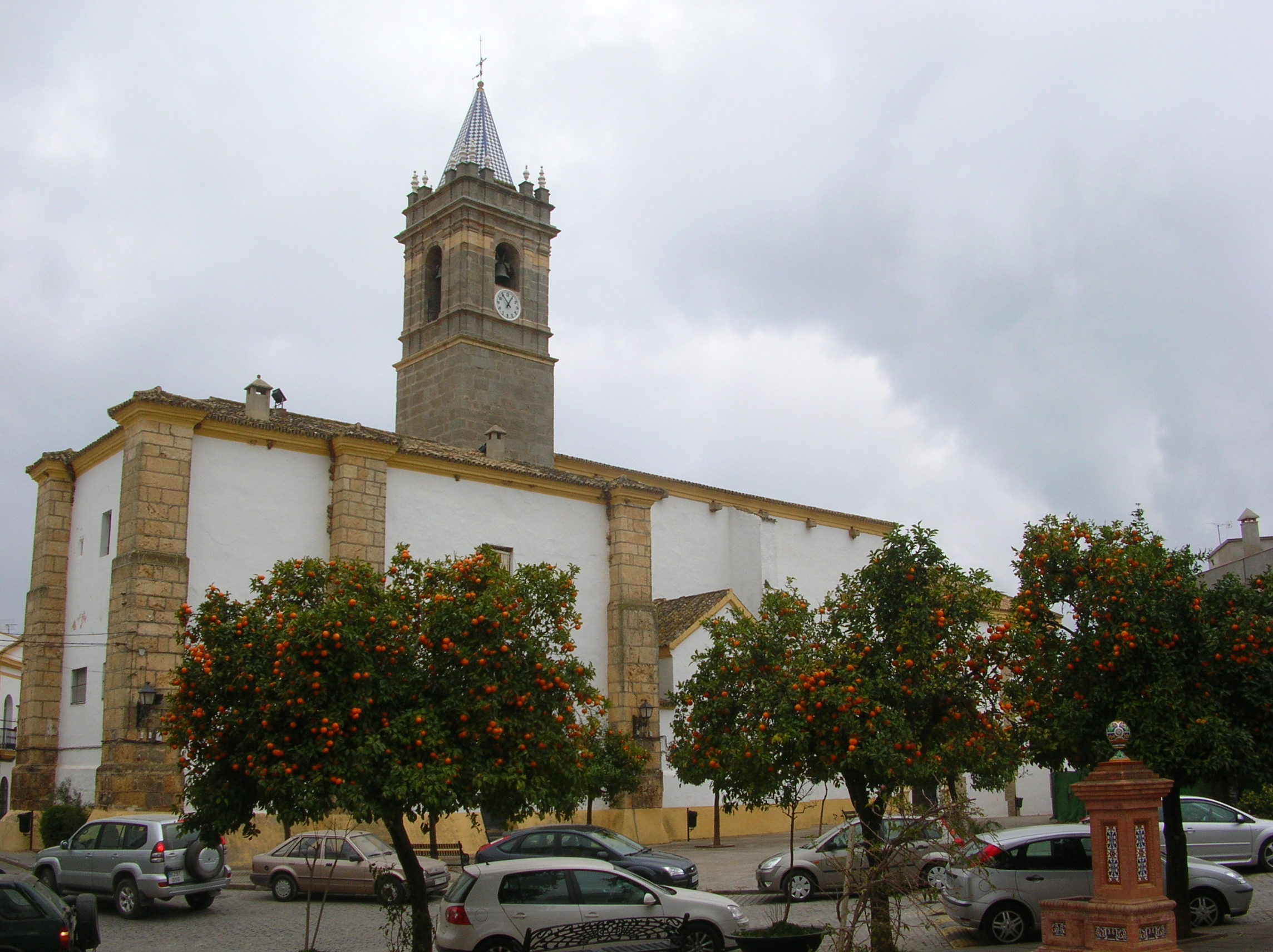 Eglise d'El Pedroso (Sevilla)